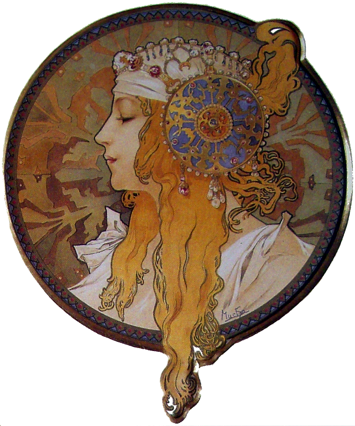 «Головы византиек». «Блондинка»